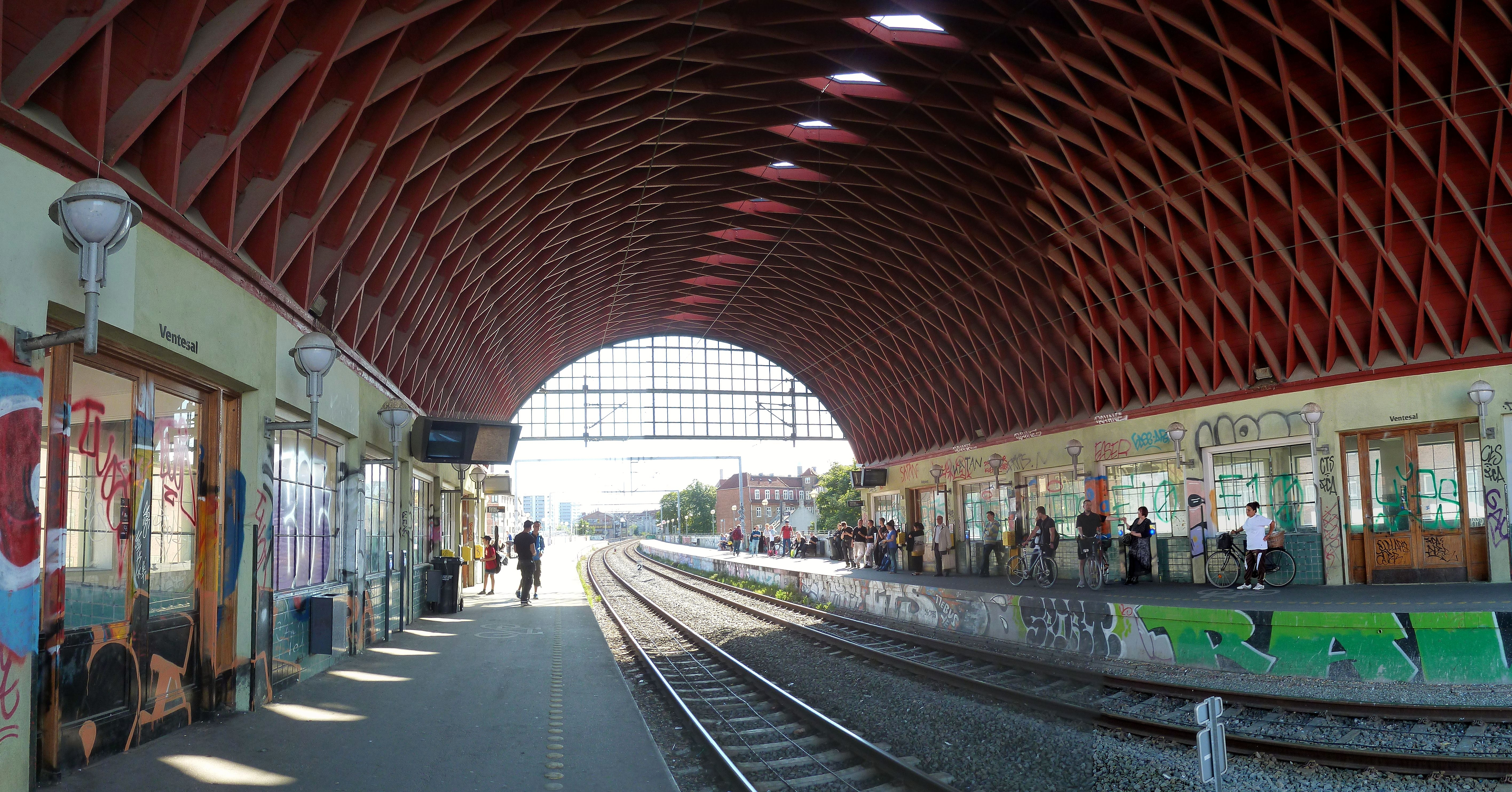 The platforms at Nørrebro station in Nørrebro, Copenhagen, Denmark